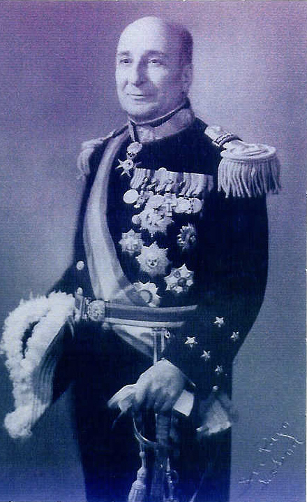 Vice-Almirante Fernando de Quintanilha e Mendonça Dias